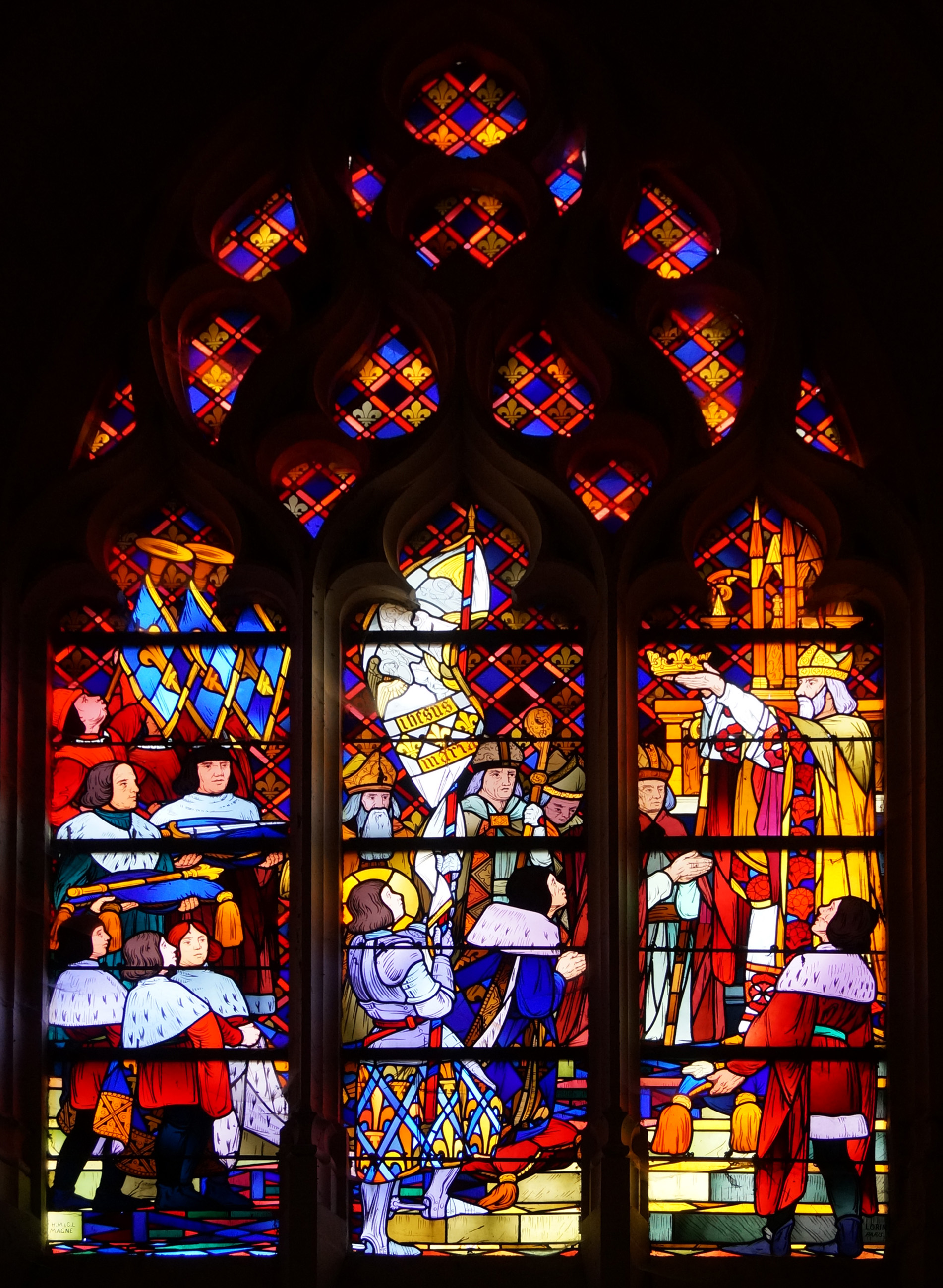 église du Breuil (Marne).